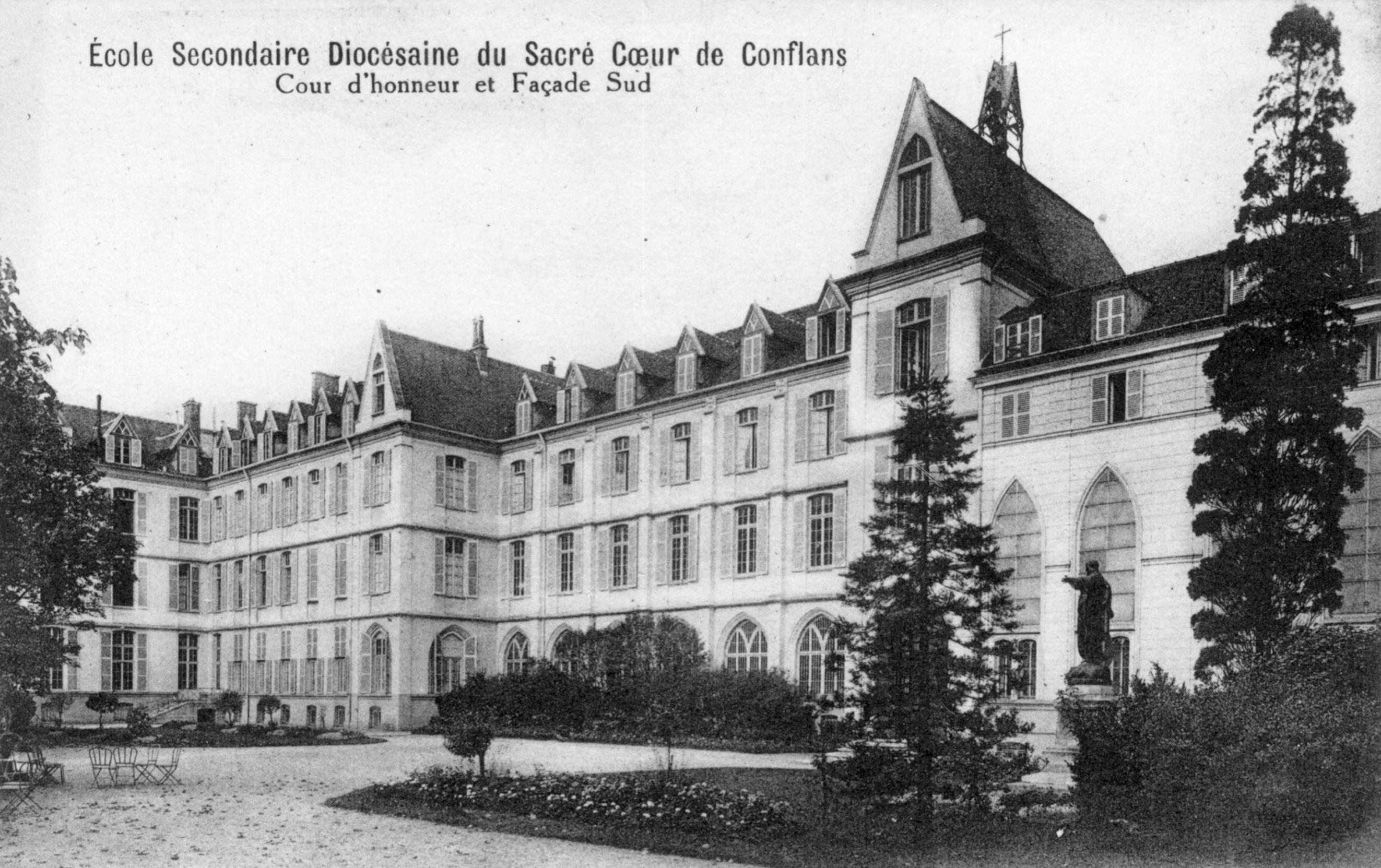 Ecole secondaire diocésaine du Sacré-Coeur de Conflans. Cour d'honneur et façade Sud.